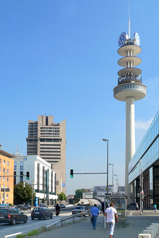 Westauffahrt der Raschplatz-Hochstraße in Hannover. Links im Bild: Das Bredero-Hochhaus, rechts der frühere Fernsehturm; auch bekannt unter dem Namen "Telemoritz" Foto aufgenommen von Benutzer Benutzer:Axel Hindemith, September 2005